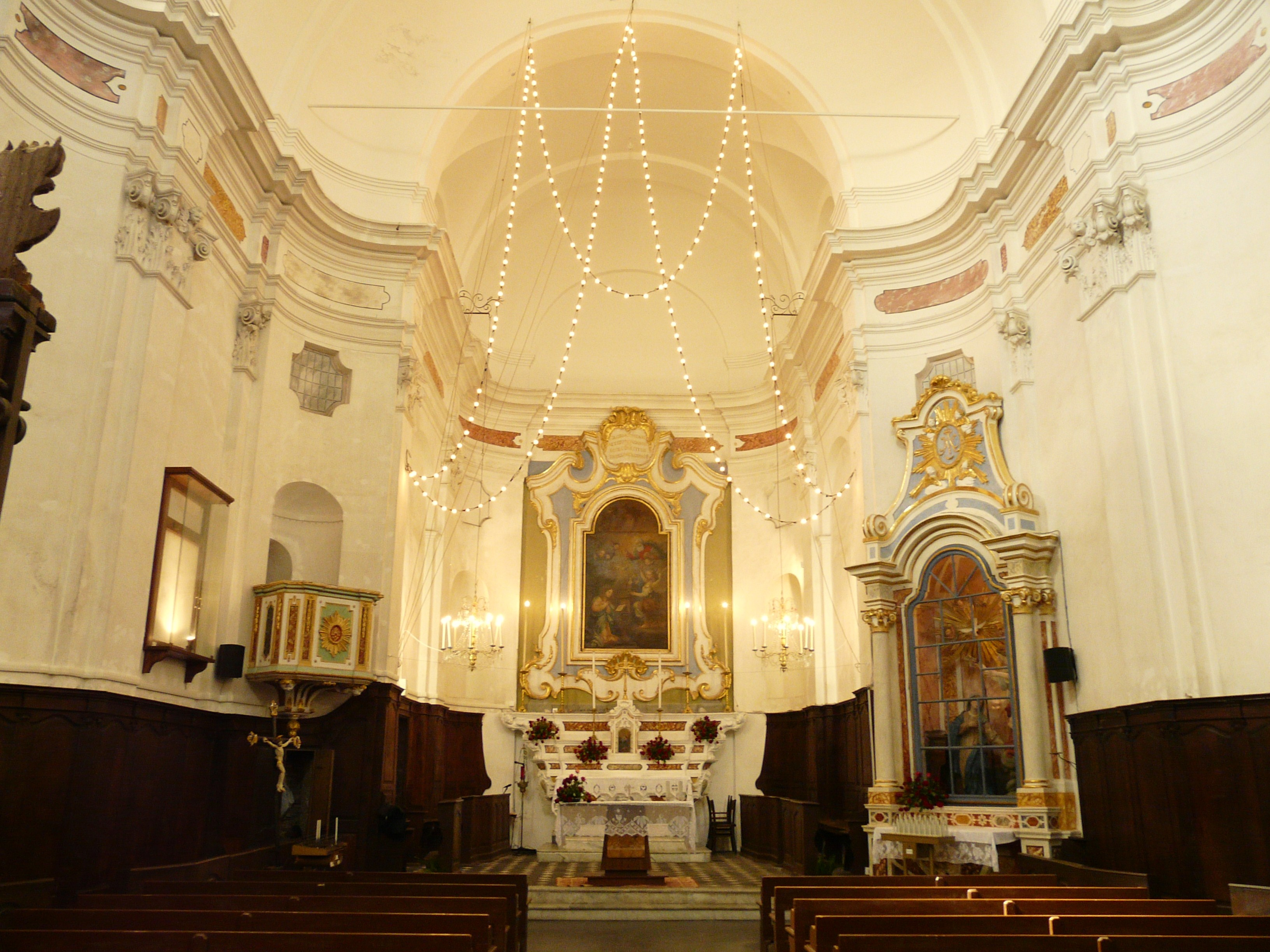 Oratorio della Santissima Annunziata, Cipressa, Liguria, Italia